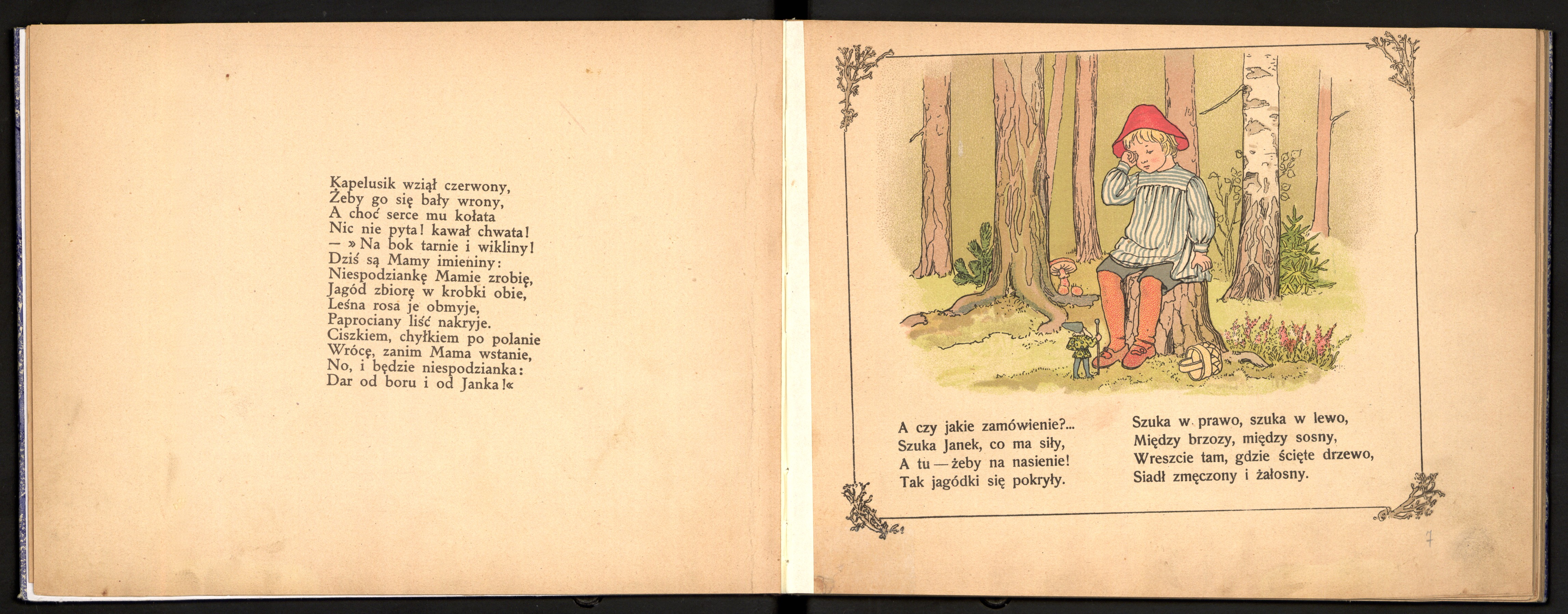 Maria Konopnicka, "Na jagody" (fragment), 1924 r.